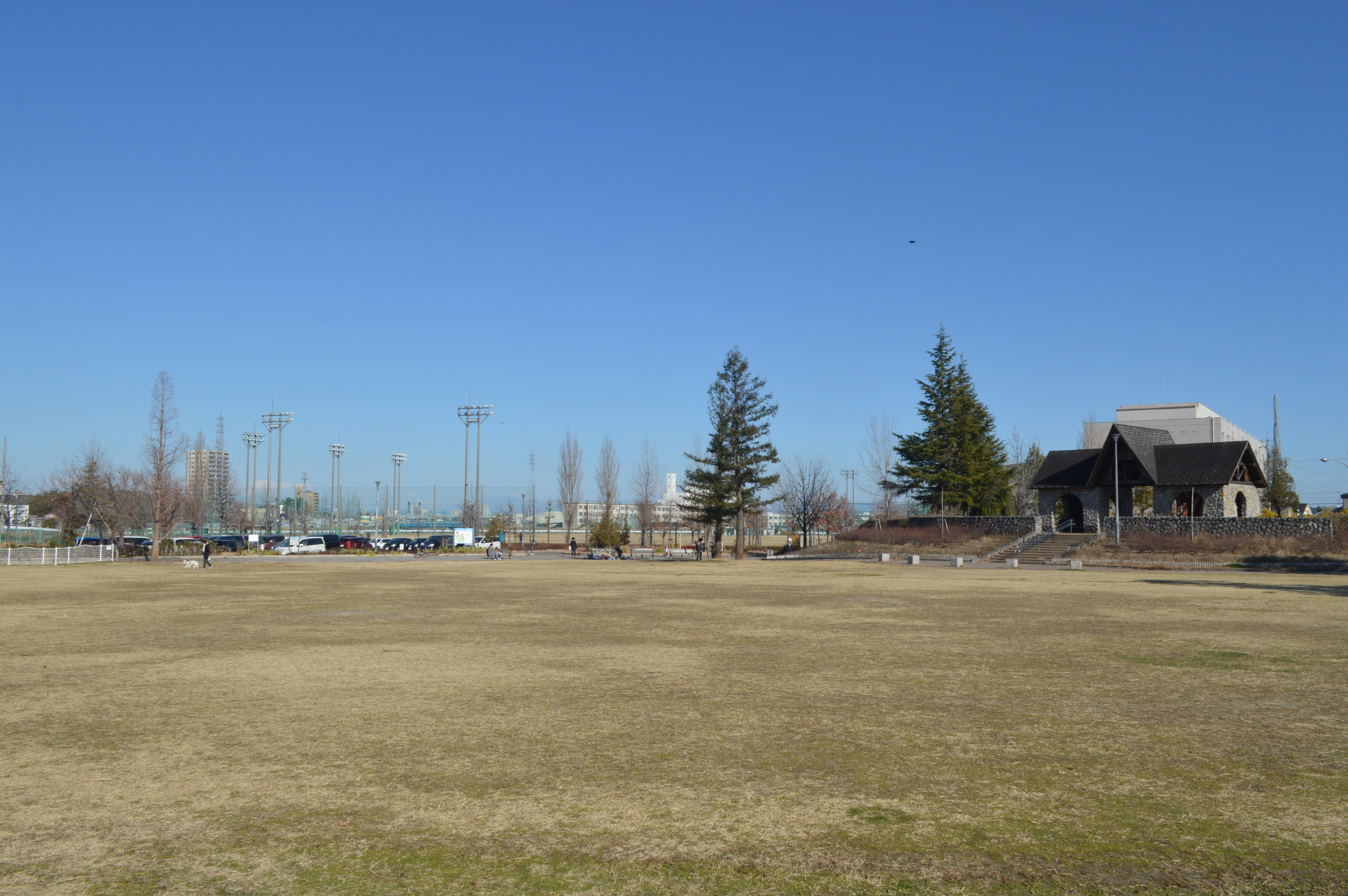 愛知県刈谷市にあるミササガパーク。